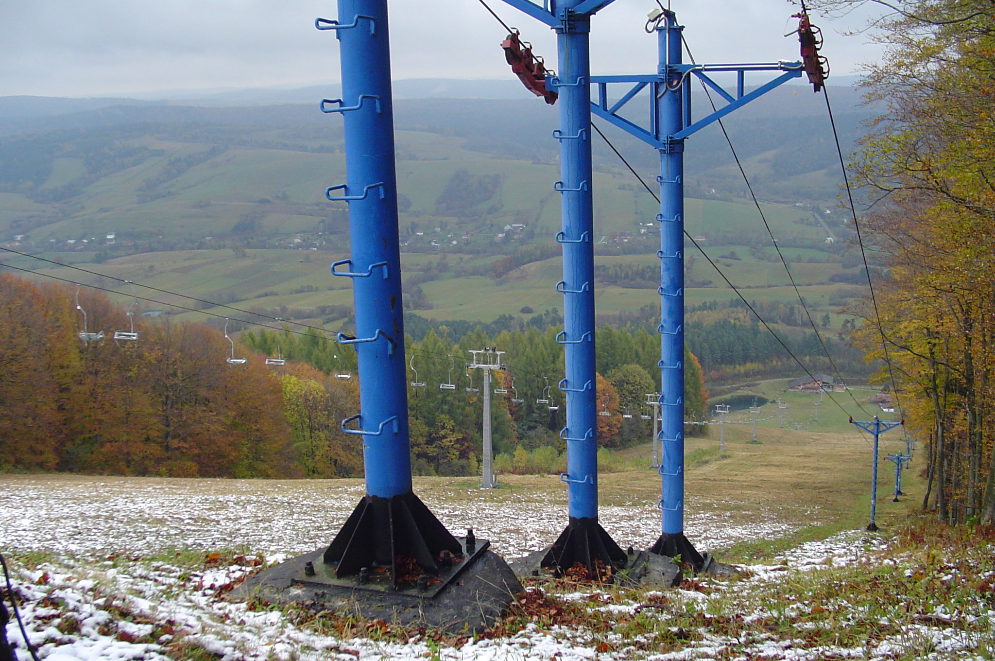 Ustrzyki Dolne, Laworta Wyciąg, Jesień